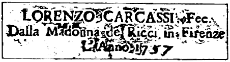 Signature Lorenzo Carcassi - 1757